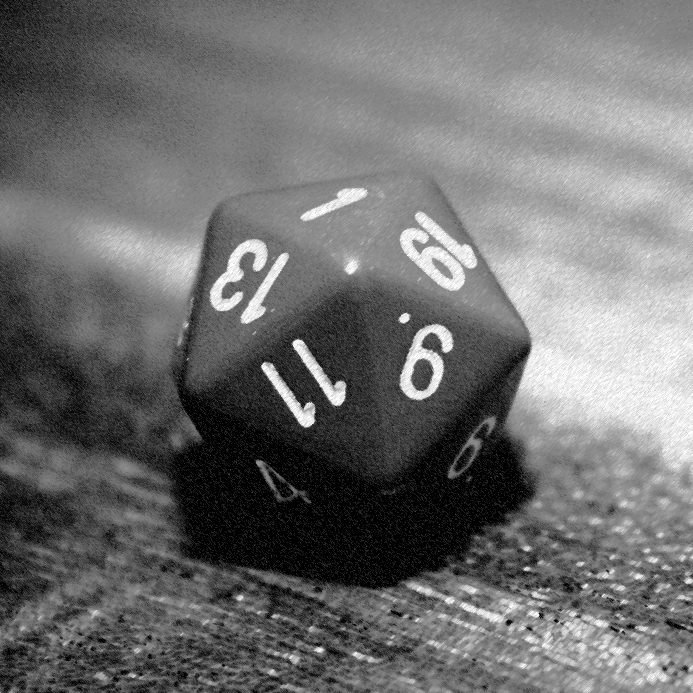 dice